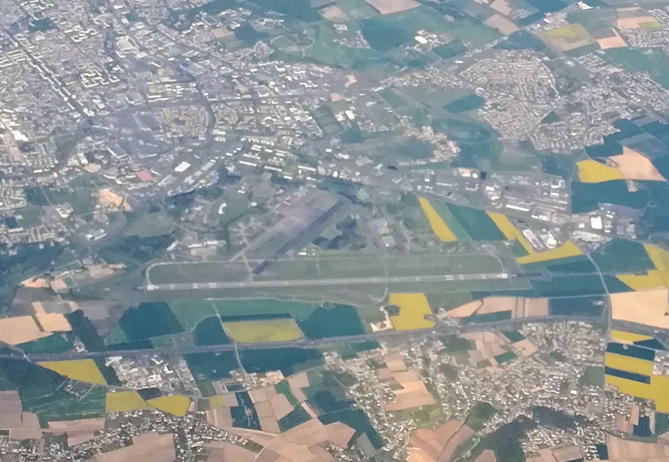 TOURS VAL DE LOIRE